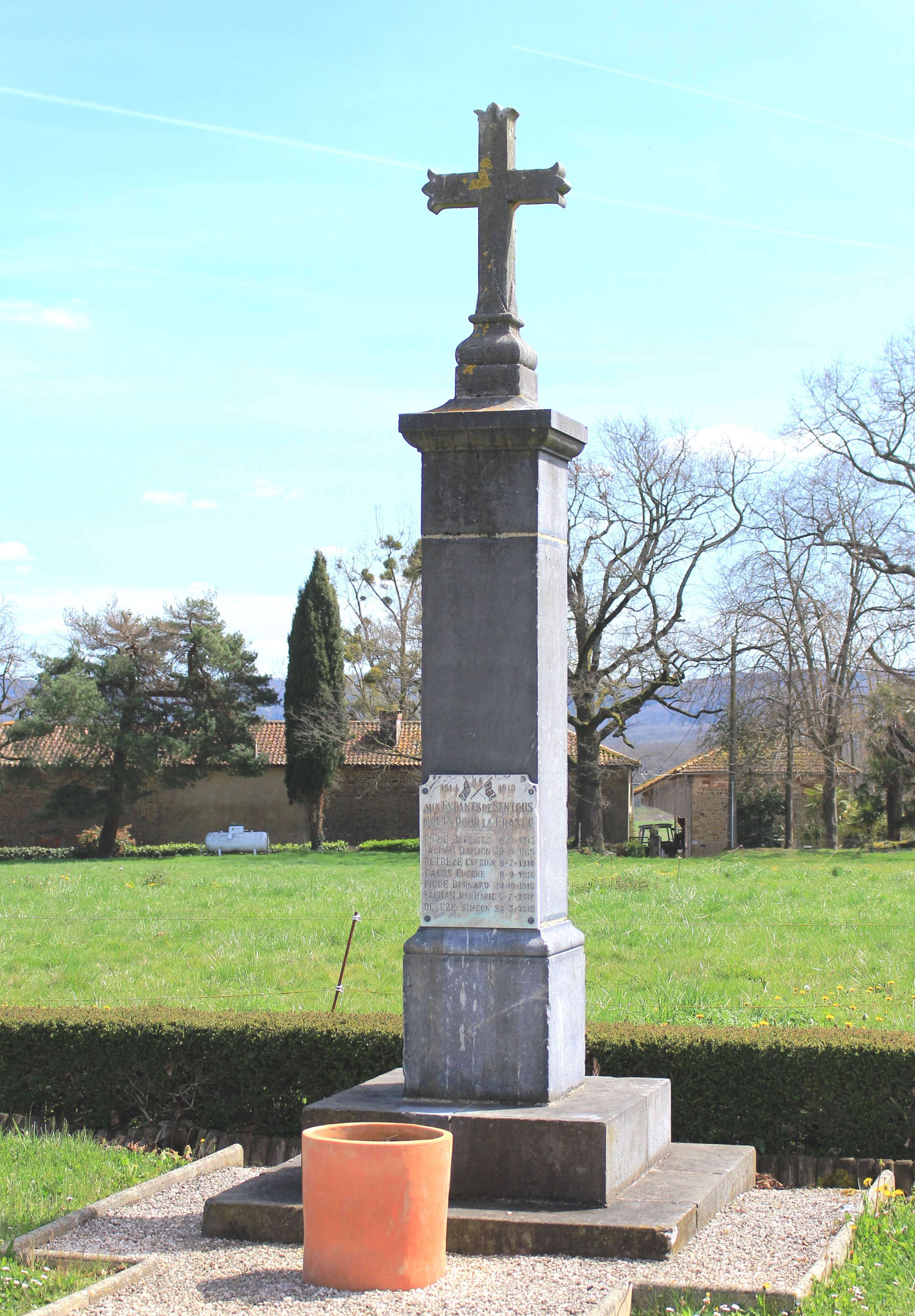 Monument aux morts de Sentous (Hautes-Pyrénées)